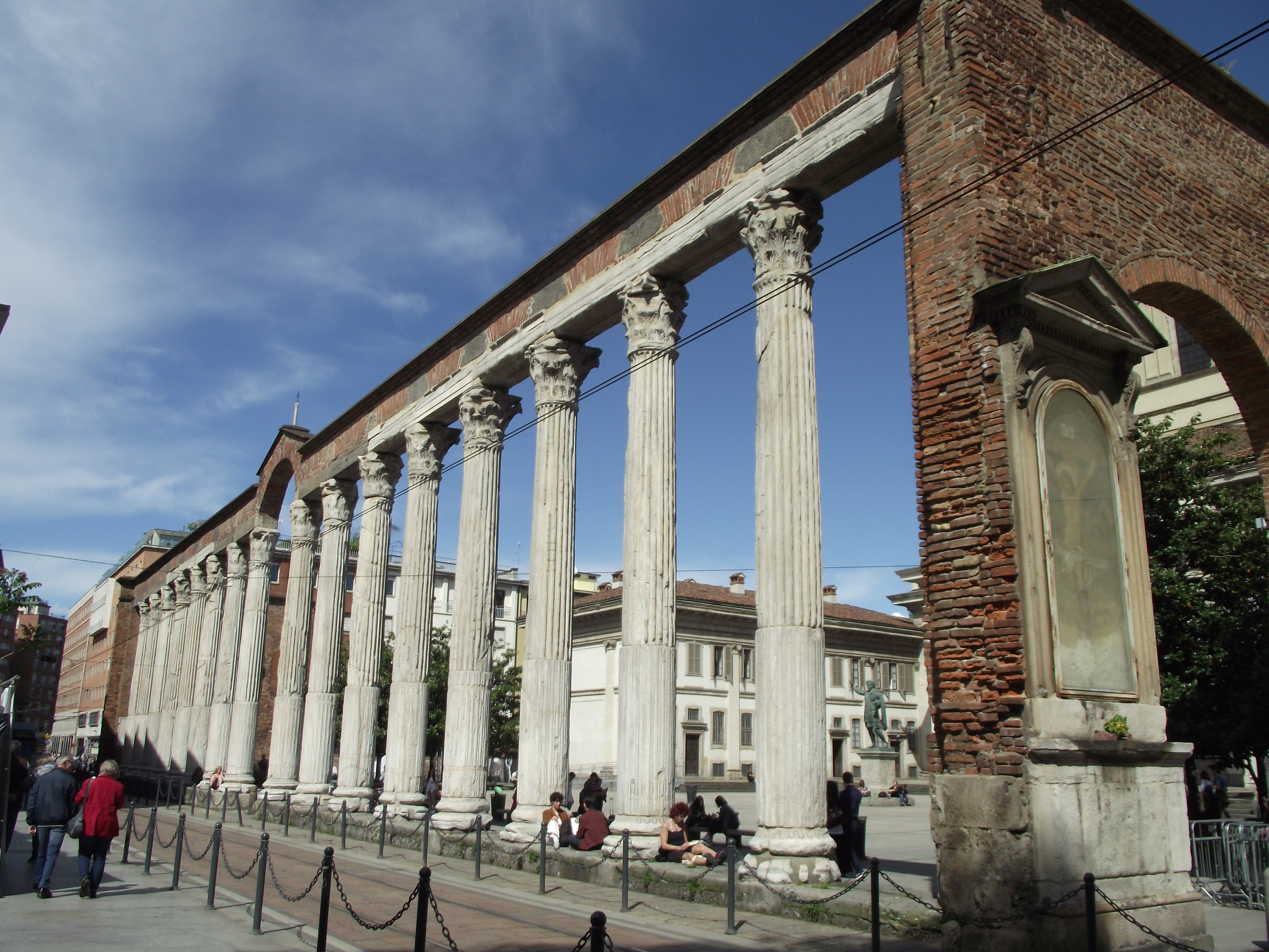 Colonnato romano.